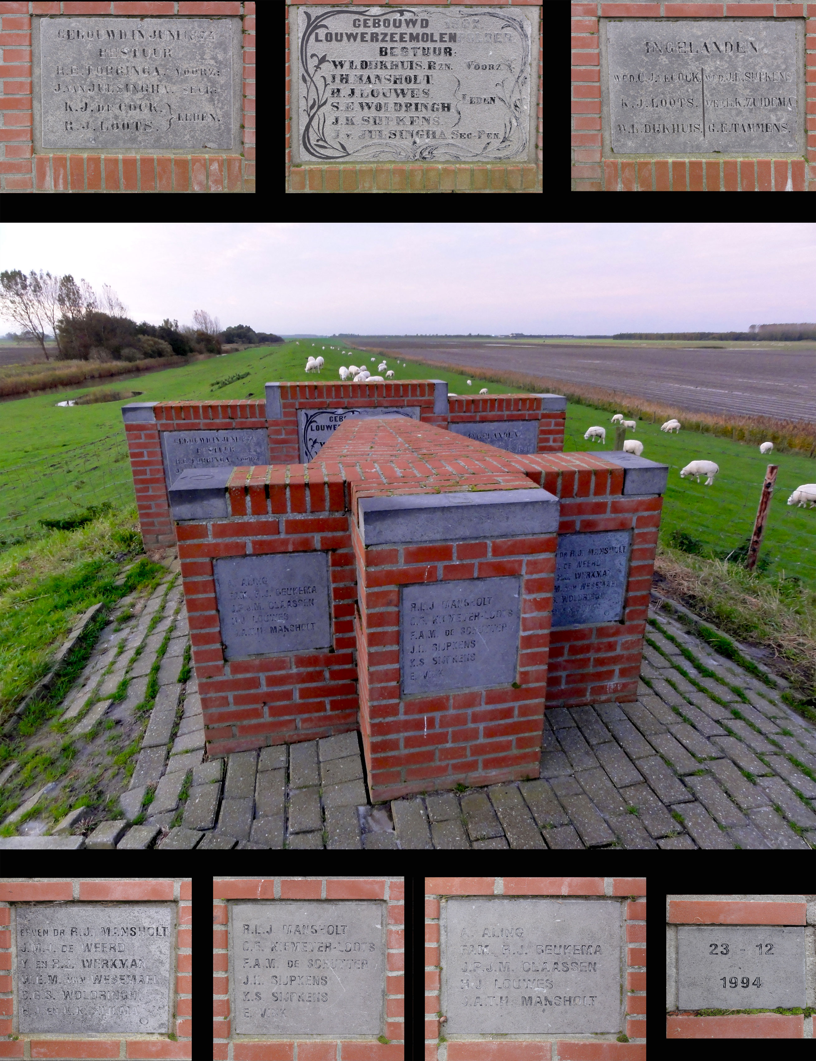 Monument bij de oude Lauwerszeedijk met een verzameling herdenkingstenen aan de indijking van de Westpolder (1873-1876), de aanleg van uitwateringsduikers in de zeedijk en de bouw van een windmolen "Hercules"